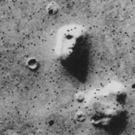 From site